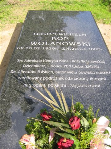 Lucjan Wolanowski's monument